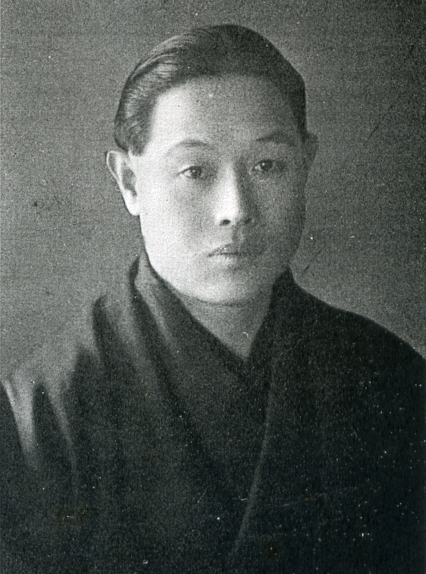 この写真は、1932年における太田正孝（1886-1982）の写真です。